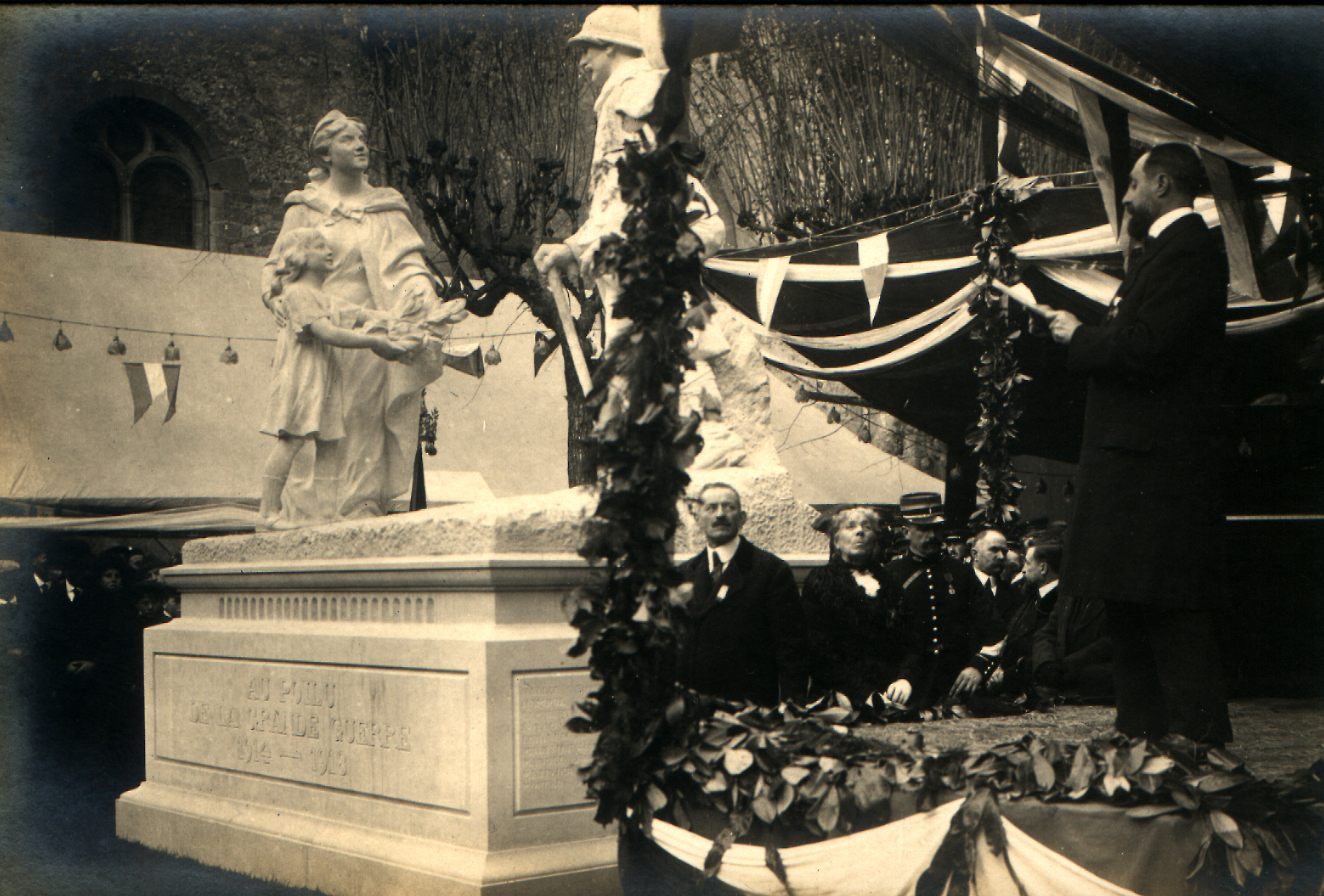 Georges Delpérier inauguration Neuillé-Pont-Pierre Au Poilu de la Grande Guerre 1914-1918